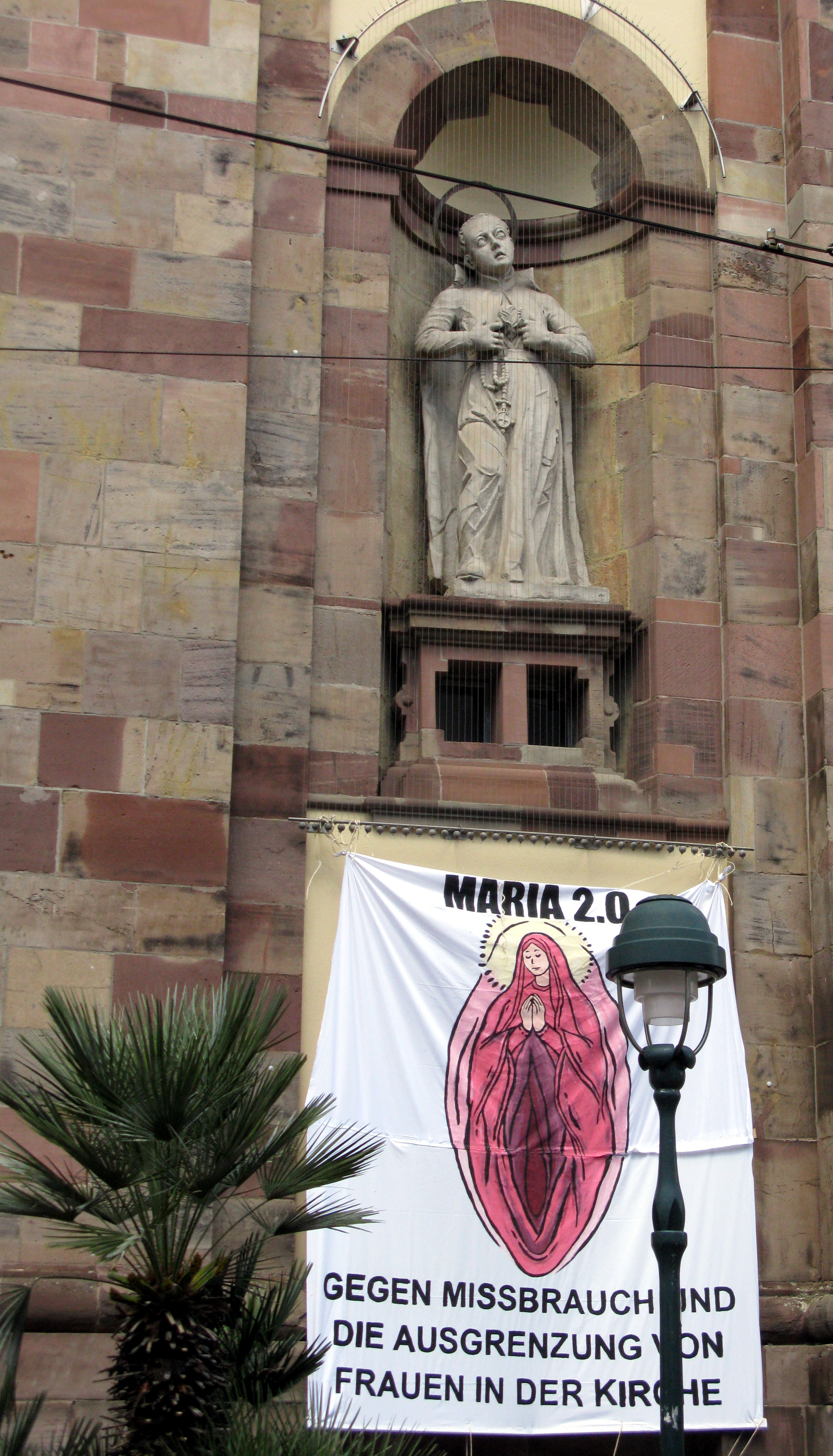 Maria 2.0-Transparent an der Freiburger Unikirche